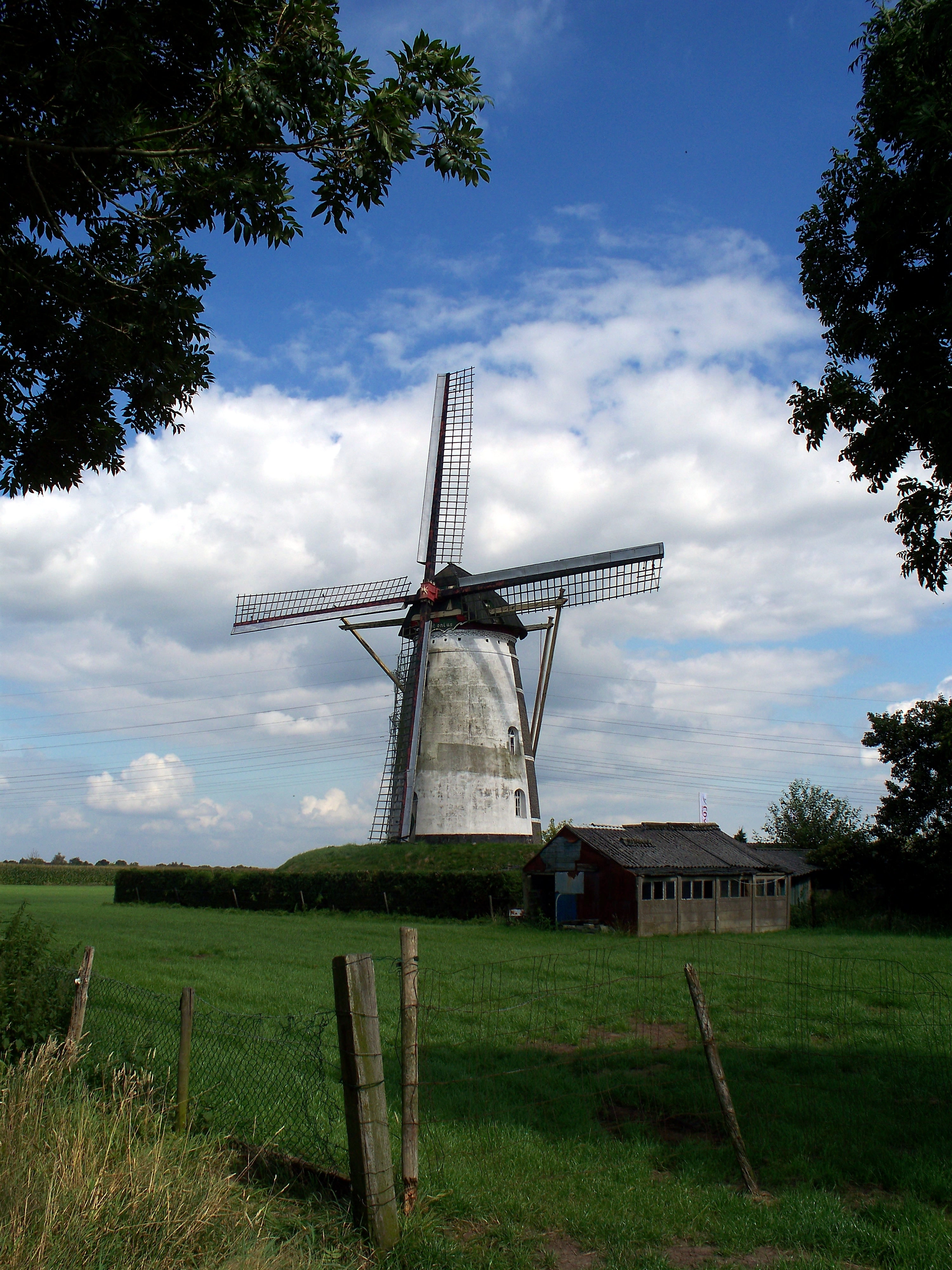 Windmolen Sint Antonius te Laar, Neelenweg (Weert)